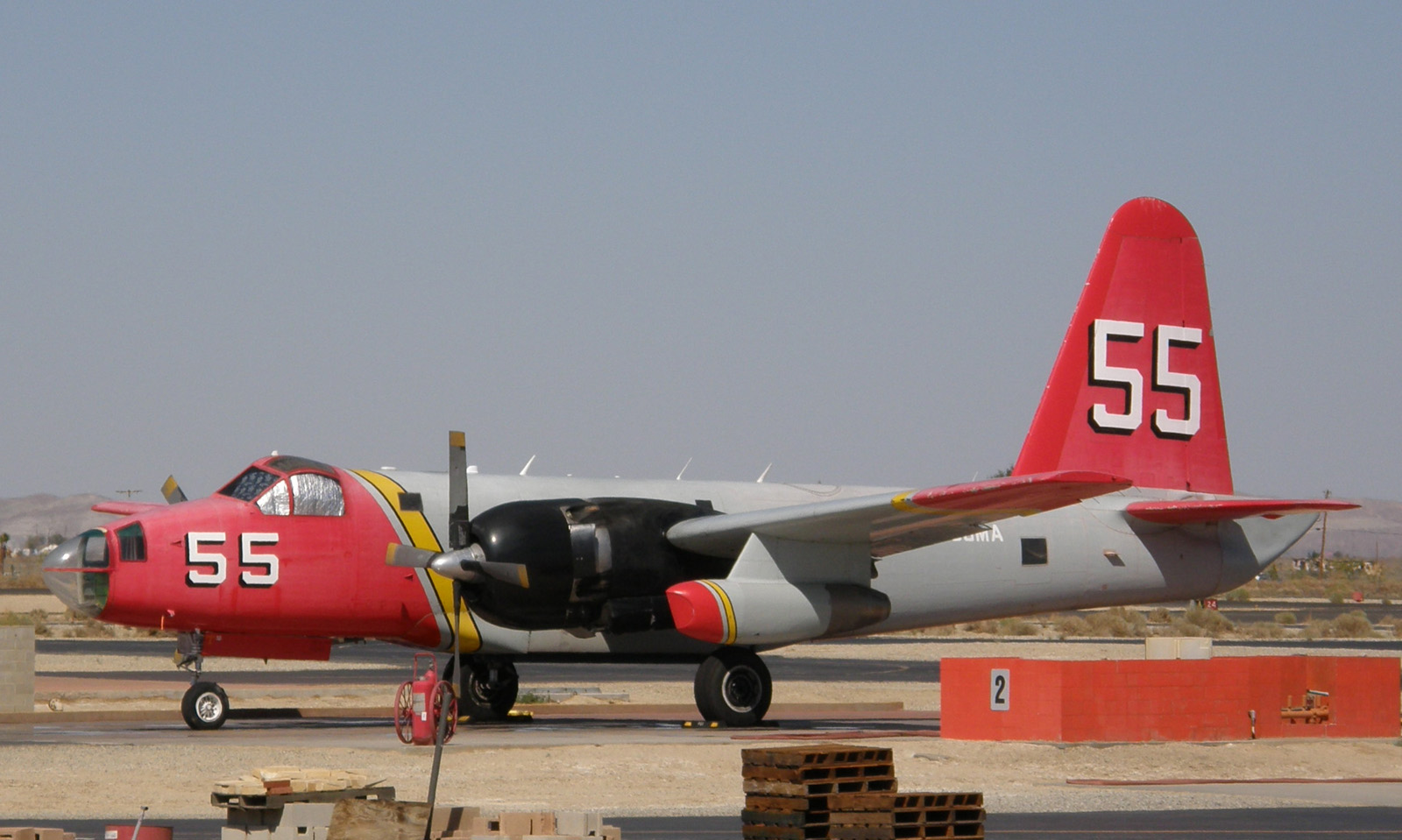 Minden Air SP-2H Neptune airtanker at Fox Field